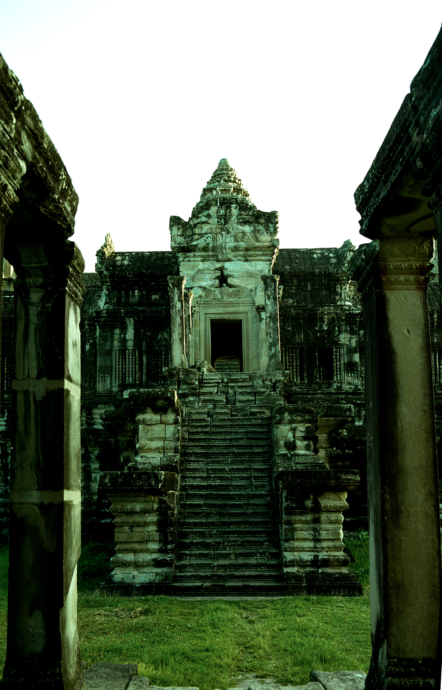 Angkor Wat pavillion gate